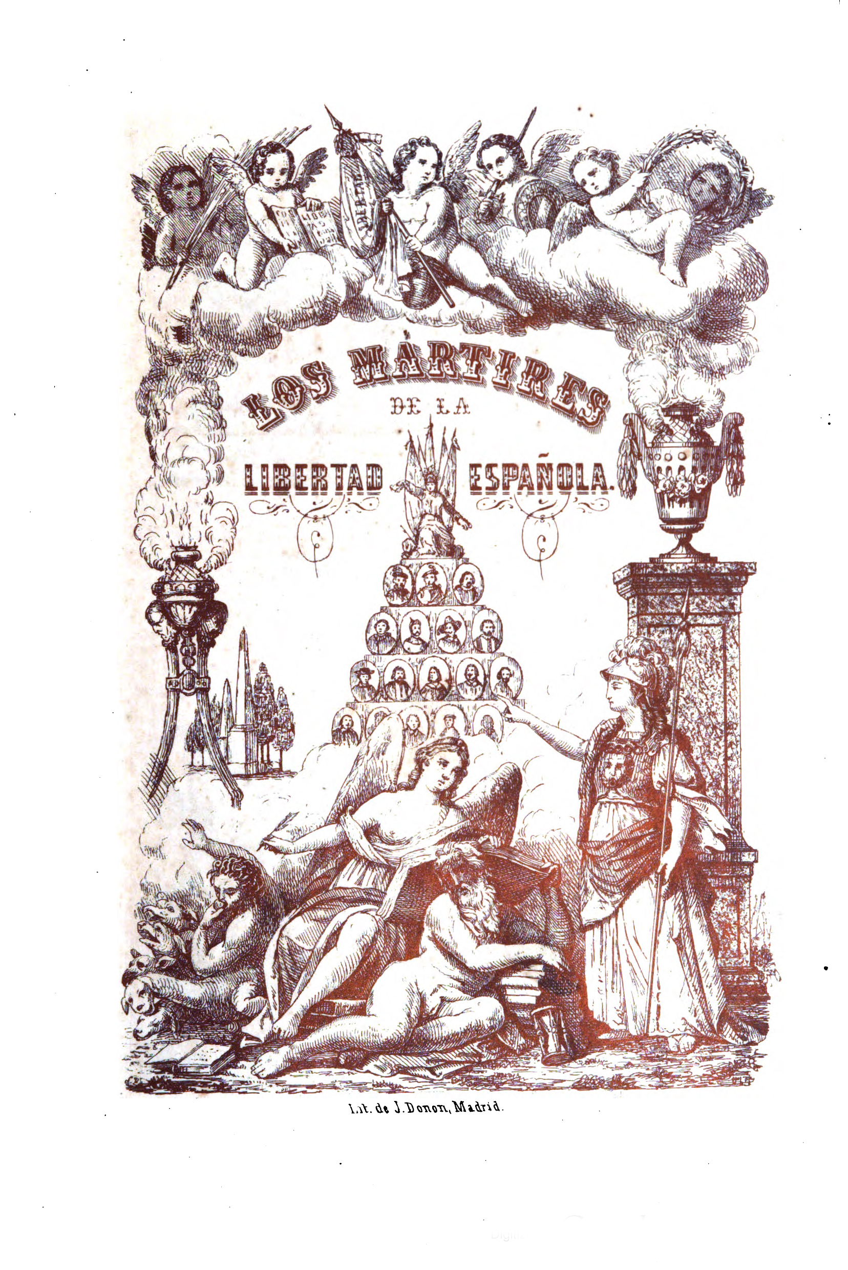 Los mártires de la libertad española.